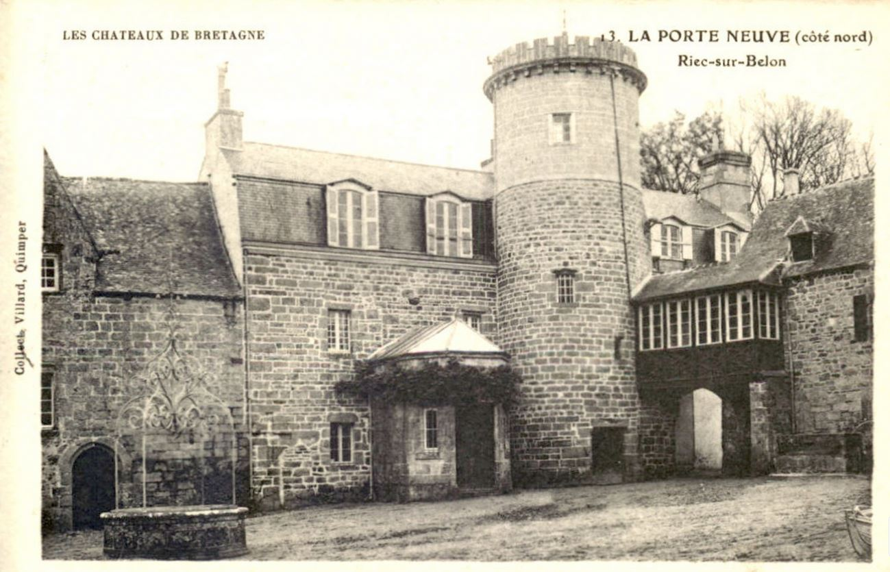 Le château de la Porte Neuve en Riec (côté nord)